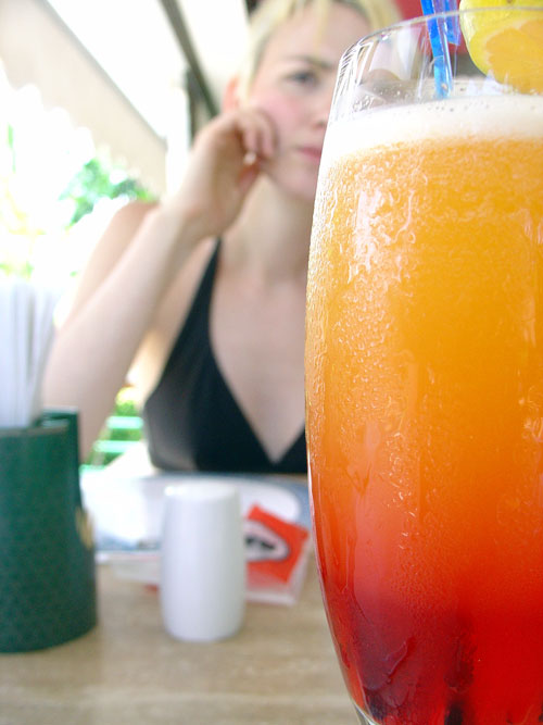 Tequila Sunrise